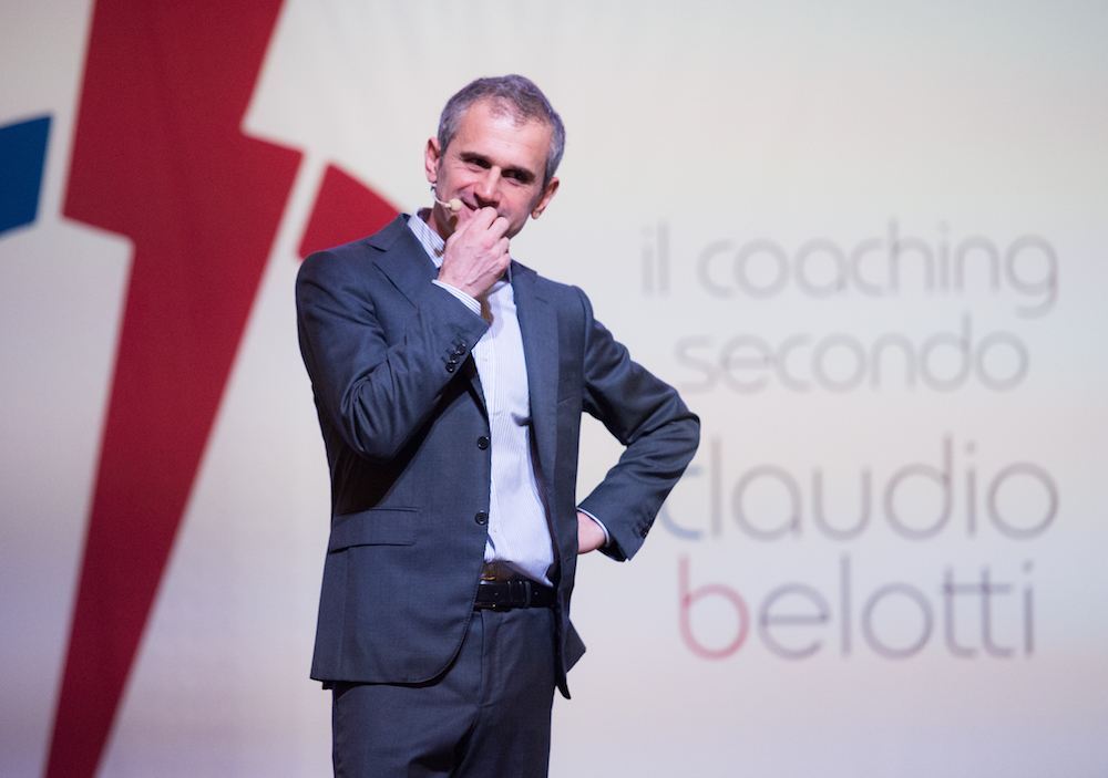 Belotti Claudio